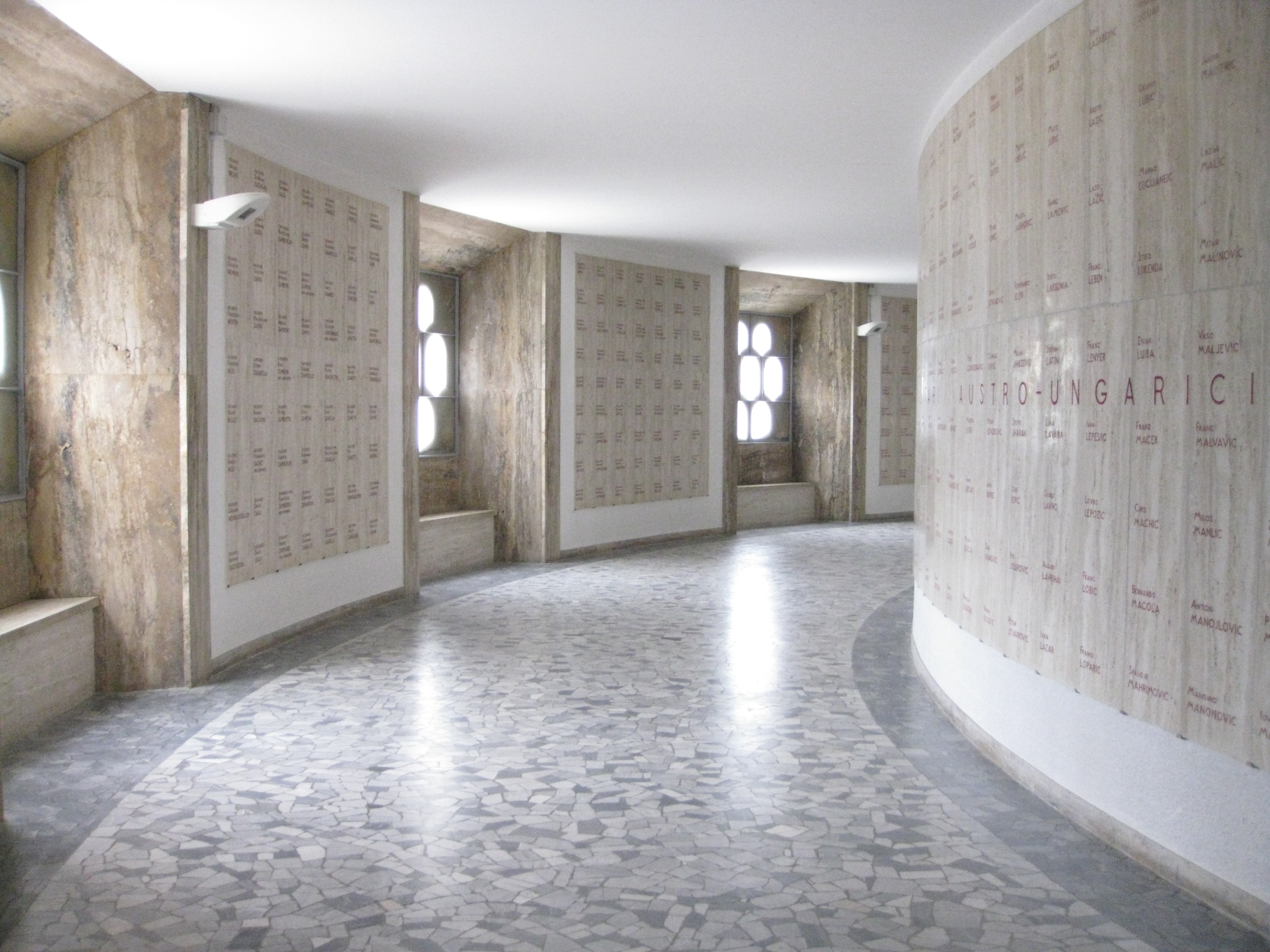 Rovereto - Ossario di Castel Dante